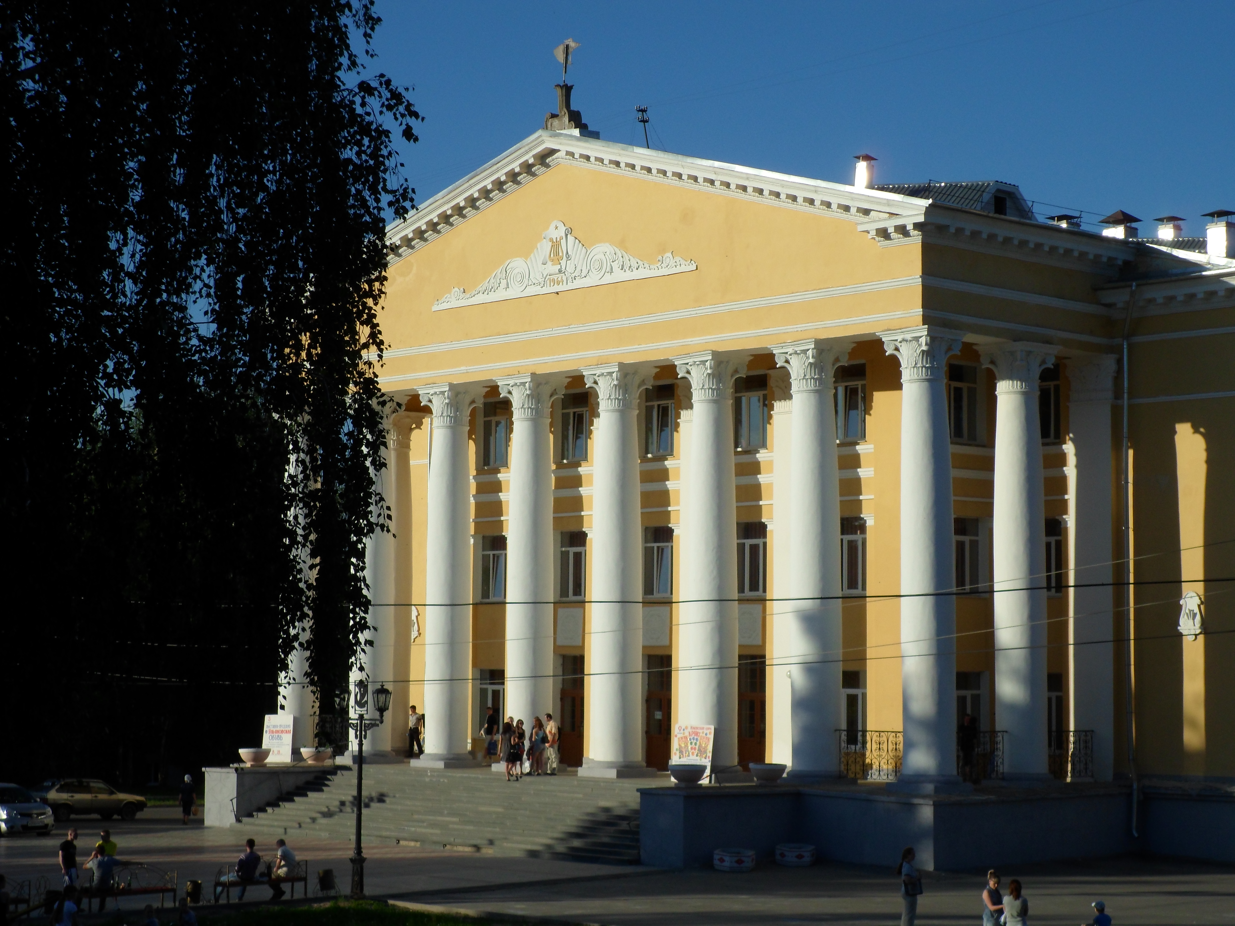 Дворец Культуры в городе Павлово